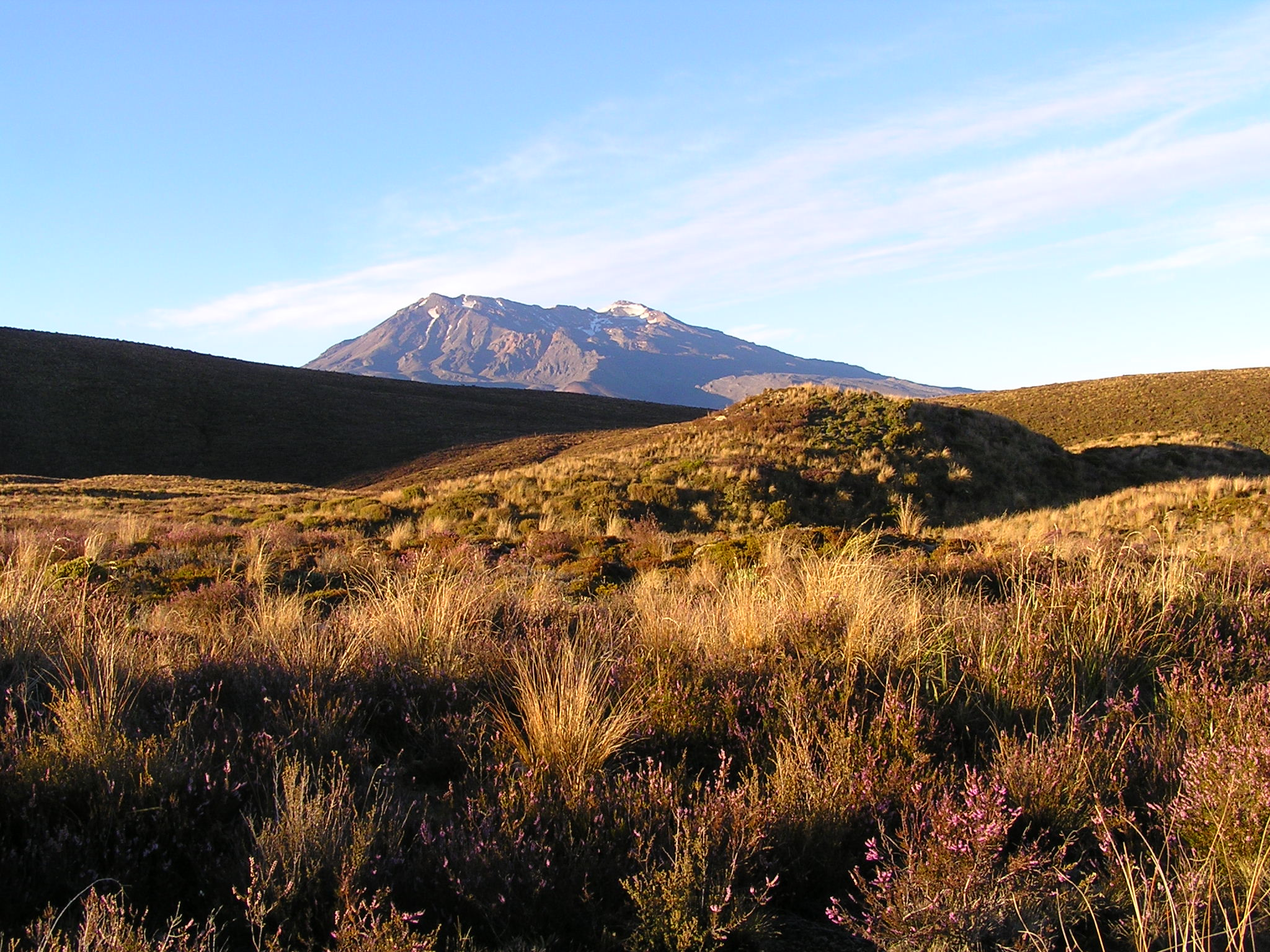 Tongariro Crossing